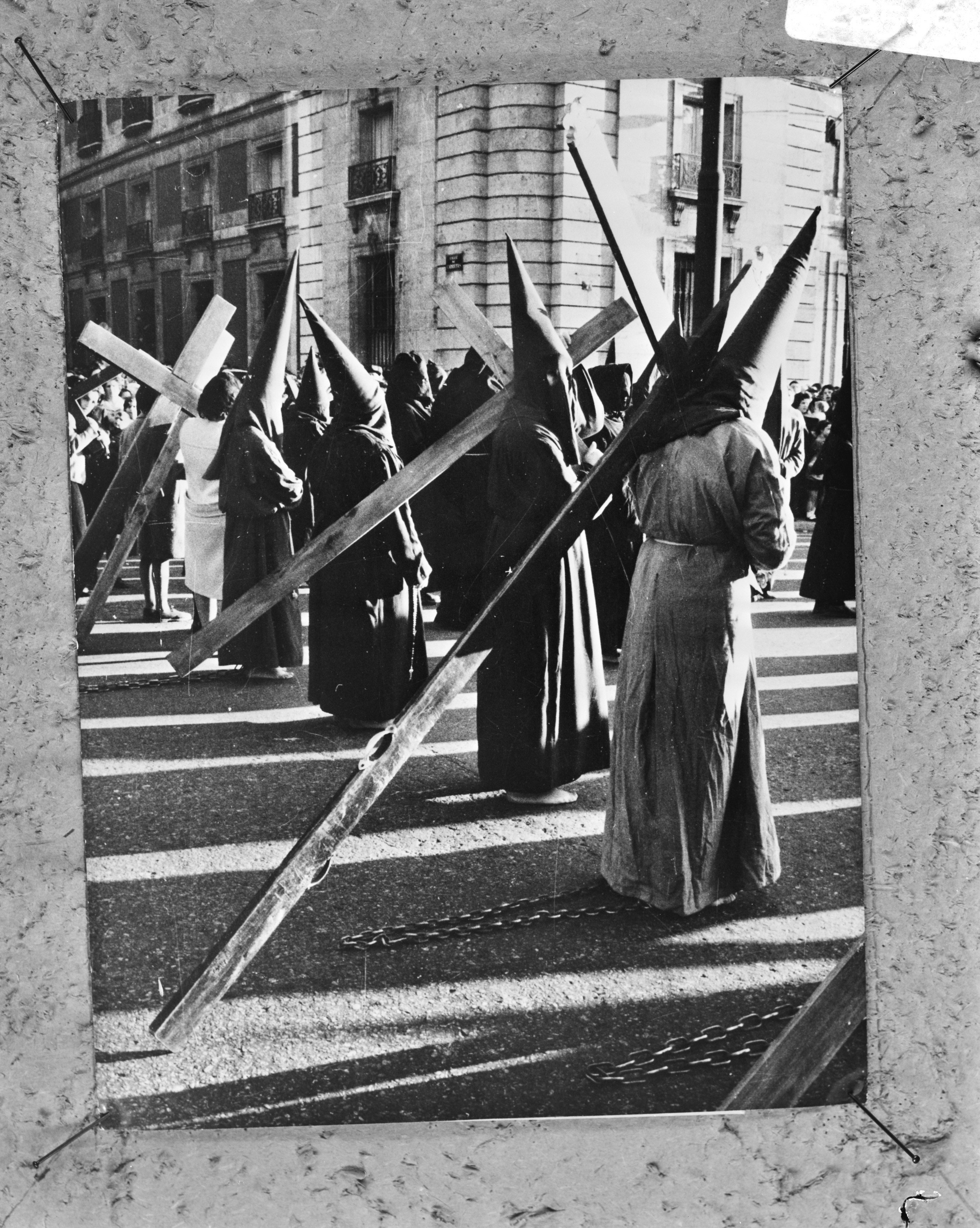 Collectie / Archief : Fotocollectie Anefo Reportage / Serie : [ onbekend ] Beschrijving : Processie in Spanje mensen gehuld in pijen met puntmutsen op en gezicht verborgen, dragen grote kruisen Datum : 2 april 1969 Locatie : Spanje Fotograaf : [onbekend] Auteursrechthebbende : Nationaal Archief Materiaalsoort : Negatief (zwart/wit) Nummer archiefinventaris : bekijk toegang 2.24.01.04 Bestanddeelnummer : 922-2595